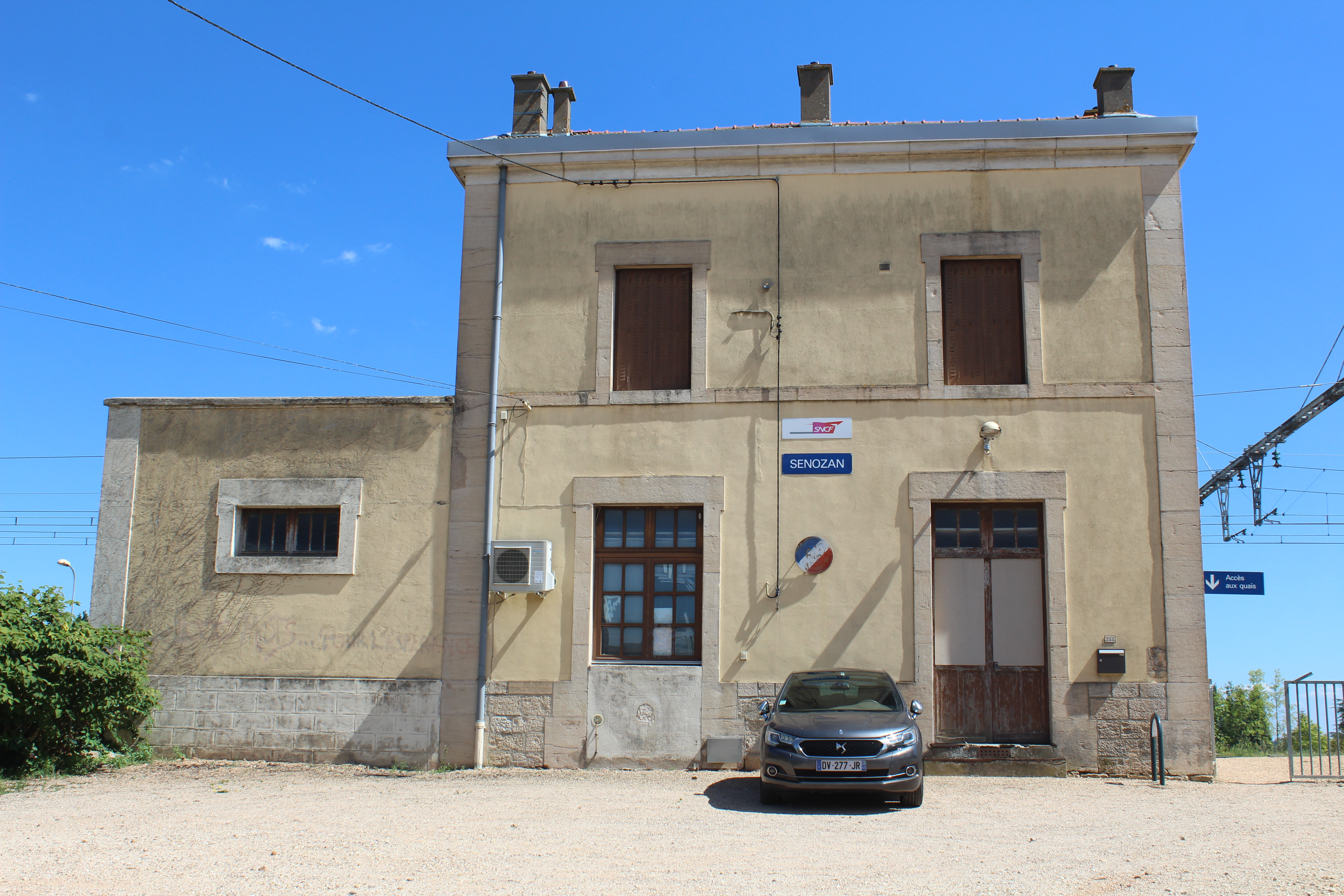 Gare de Senozan.